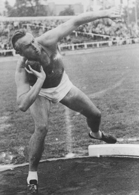 Ernst Schmidt Zentralbild 3 Motive 27.7.1954 DDR-Leichtathletik-Meisterschaften im Dresdner Harbigstadion Juli 1954 UBz: Kugelstossen - Ernst Schmidt.